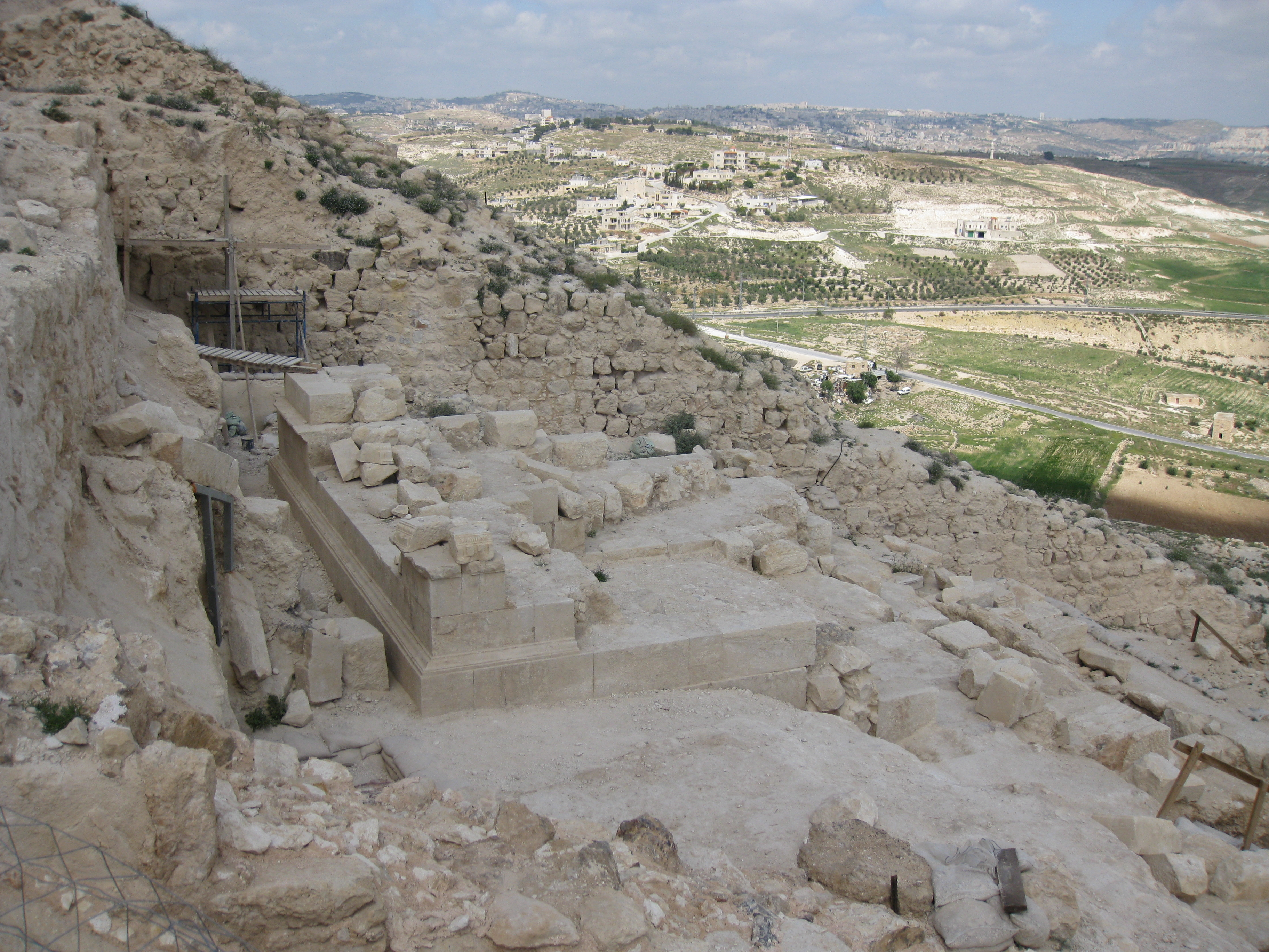 Herod's tomb in Herodion (Herodyon, Herodium) שרידי קבר הורדוס, הרודיון